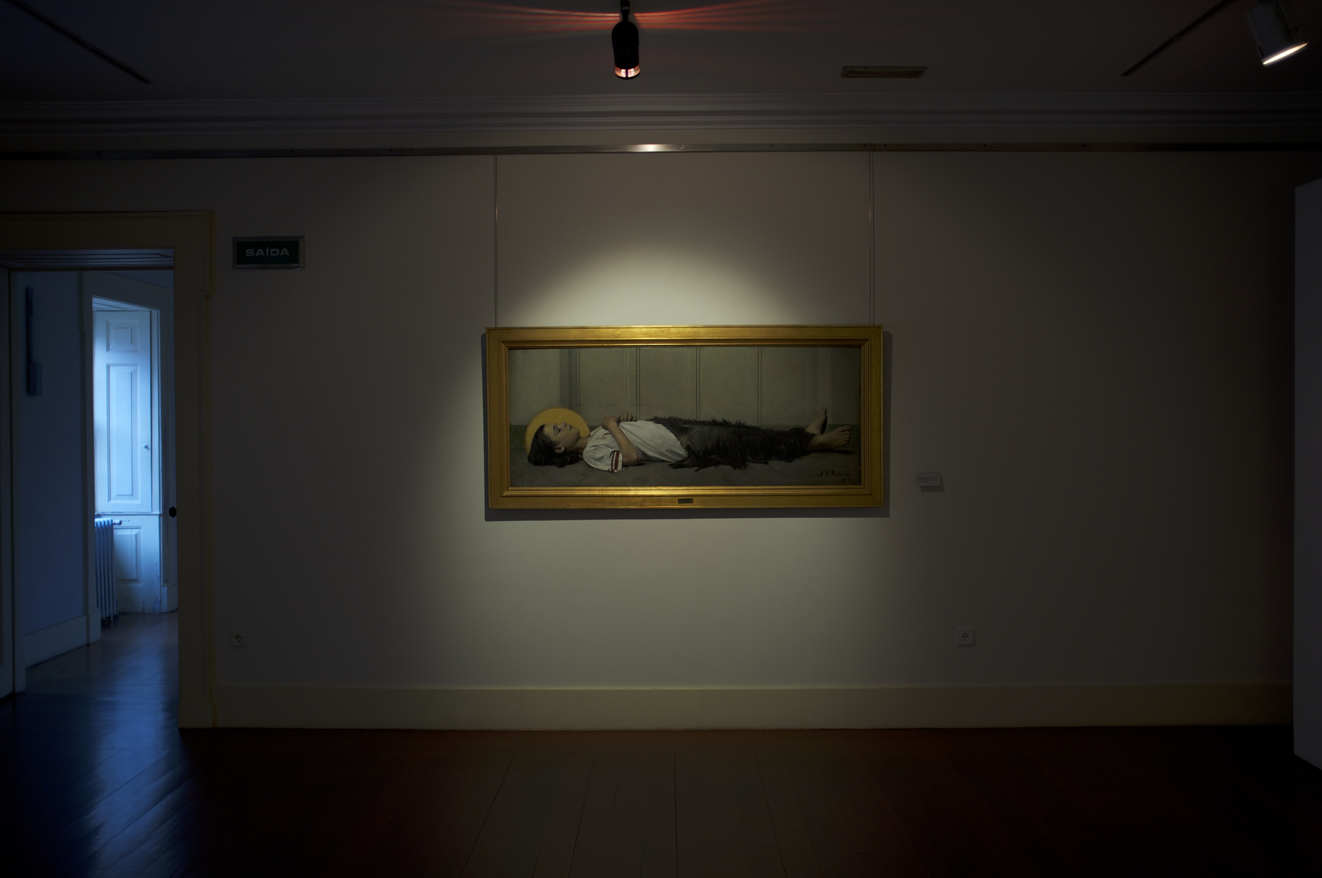 Porto